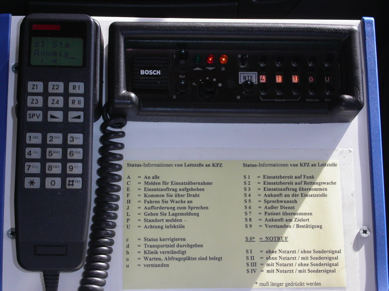 Bosch FuG8b 4m Band BOS Funkgerät mit FMS Sprechgarnitur vom Typ Commander5 und einer Funkmeldesystem Statusübersicht für den Krankentransport / Rettungsdienst